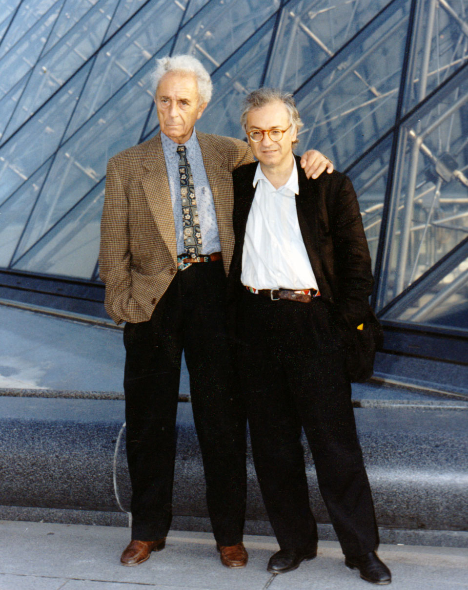 Vittorio Giacci con Michelangelo Antonioni